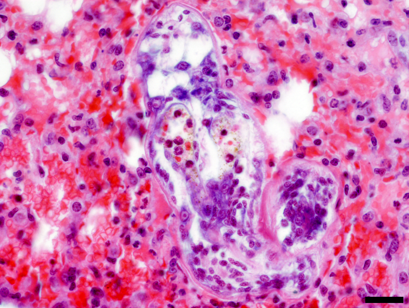 Schistosomulum T. szidati v plicích infikované myší. Tkáň okolo schistosomula je patrně překrvená. Střeva schistosomula obsahují granulocyty (fialové), erytrocyty (červené) a hnědá granula hemozoinu. Barveno hematoxylinem a eosinem, tloušťka řezů 8 um. Délka asi 130 um.